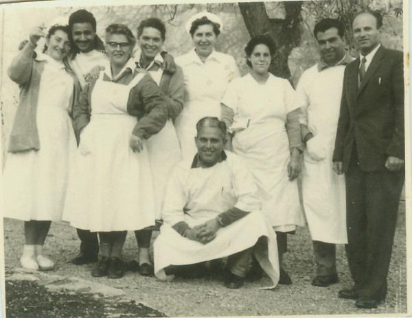 בית החולים לחולי נפש כפר שאול, ירושלים. שלישית משמאל - טוני ארמן (Ermann)